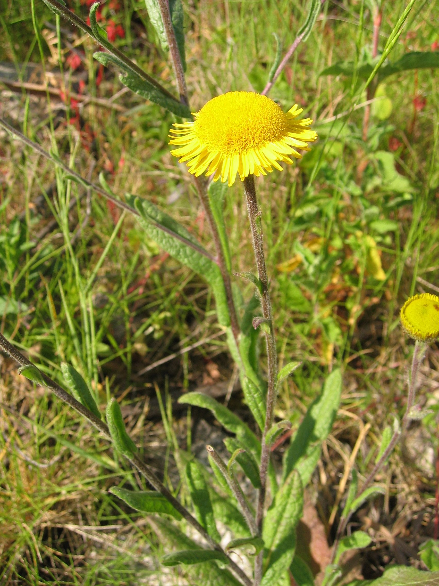 Pulicaria odora Calvi, Corse, France